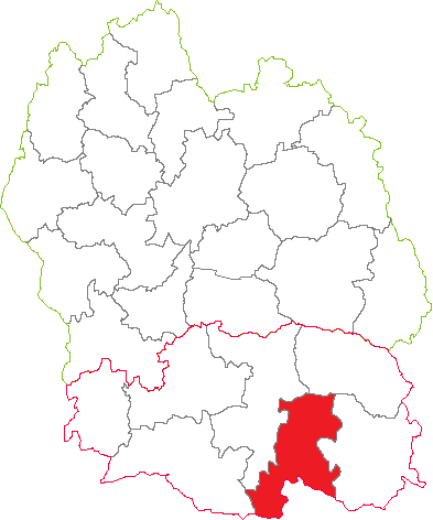 Situation du canton dans le département de la Lozère (France)